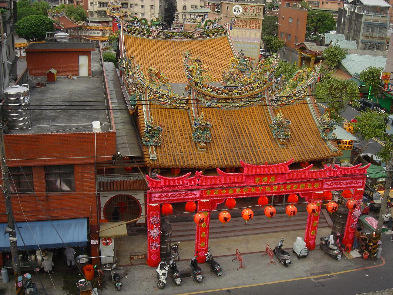 中文（台灣）: 台北縣中和市枋寮廣濟宮。